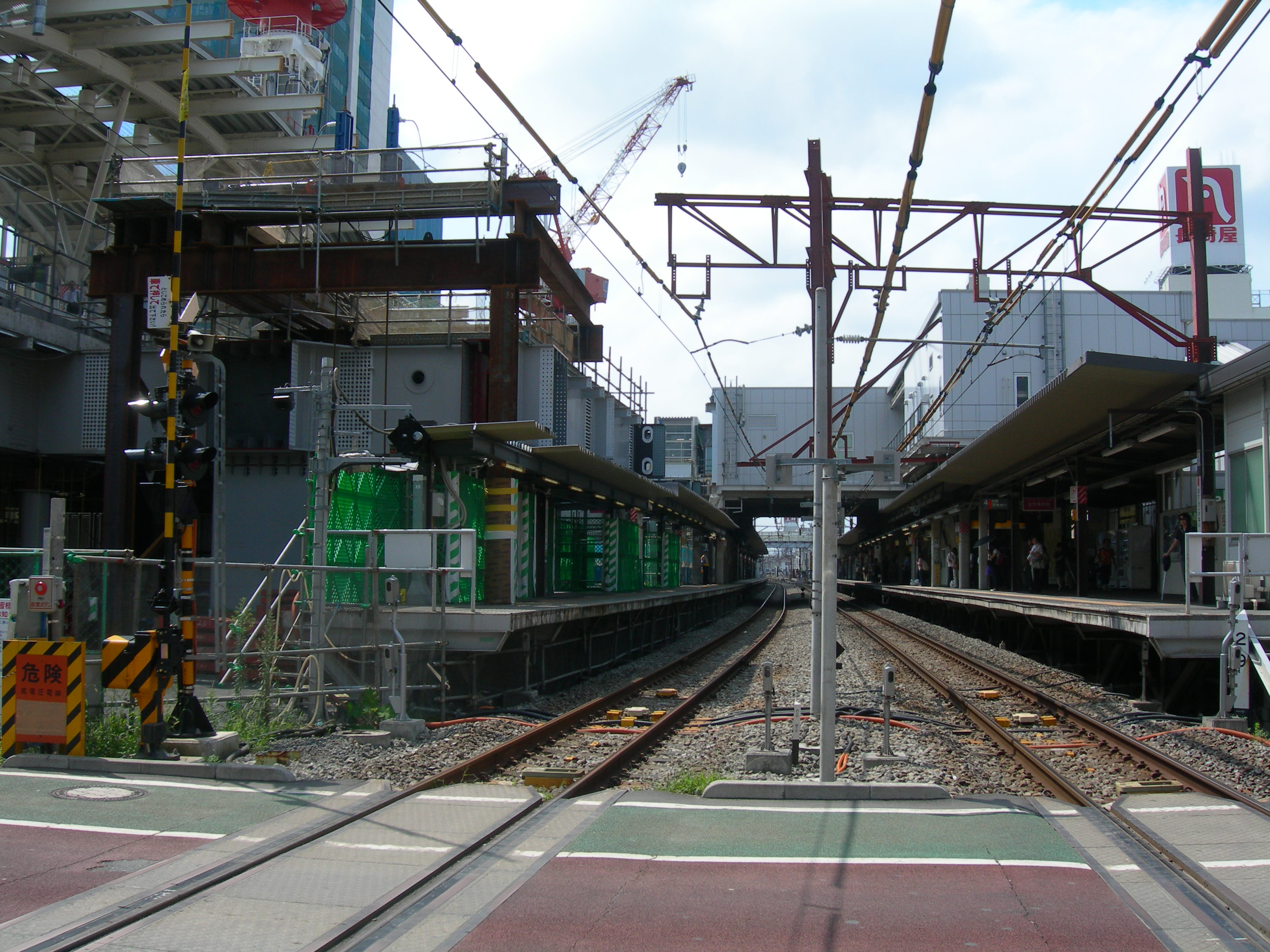 武蔵小金井駅プラットホーム